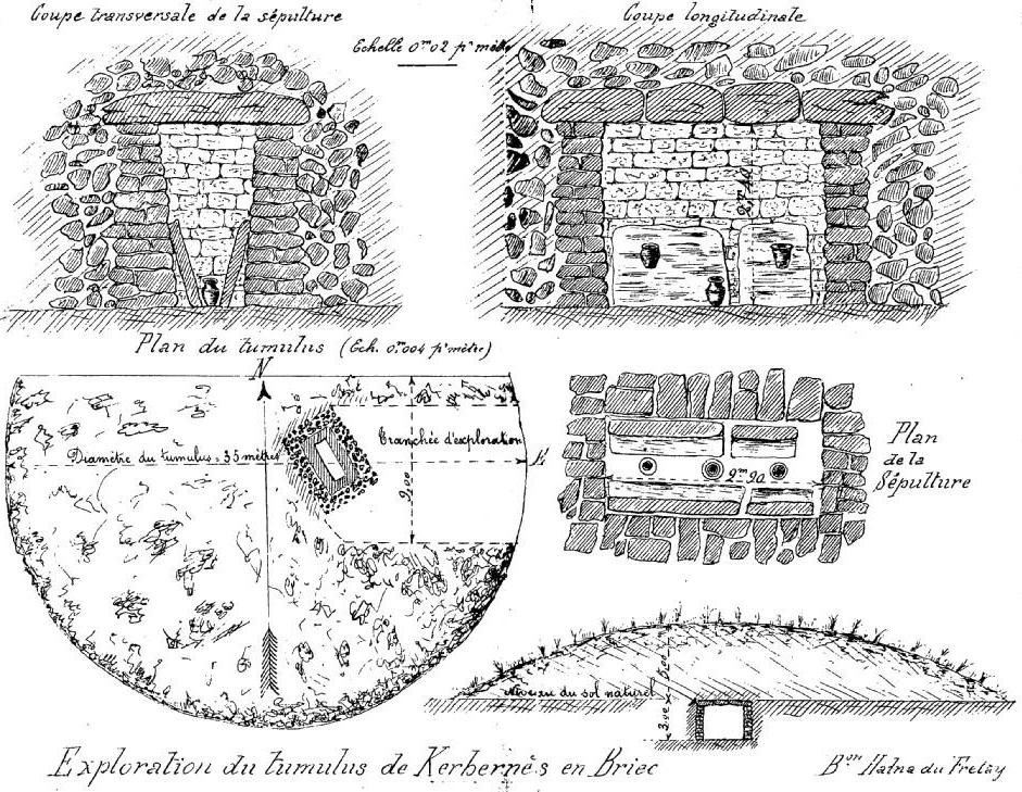 Le tumulus de Kerbernez en Briec (plans dessinés par l'archéologue Maurice Halna du Fretay (Bulletin de la Société archéologique du Finistère, 1892)